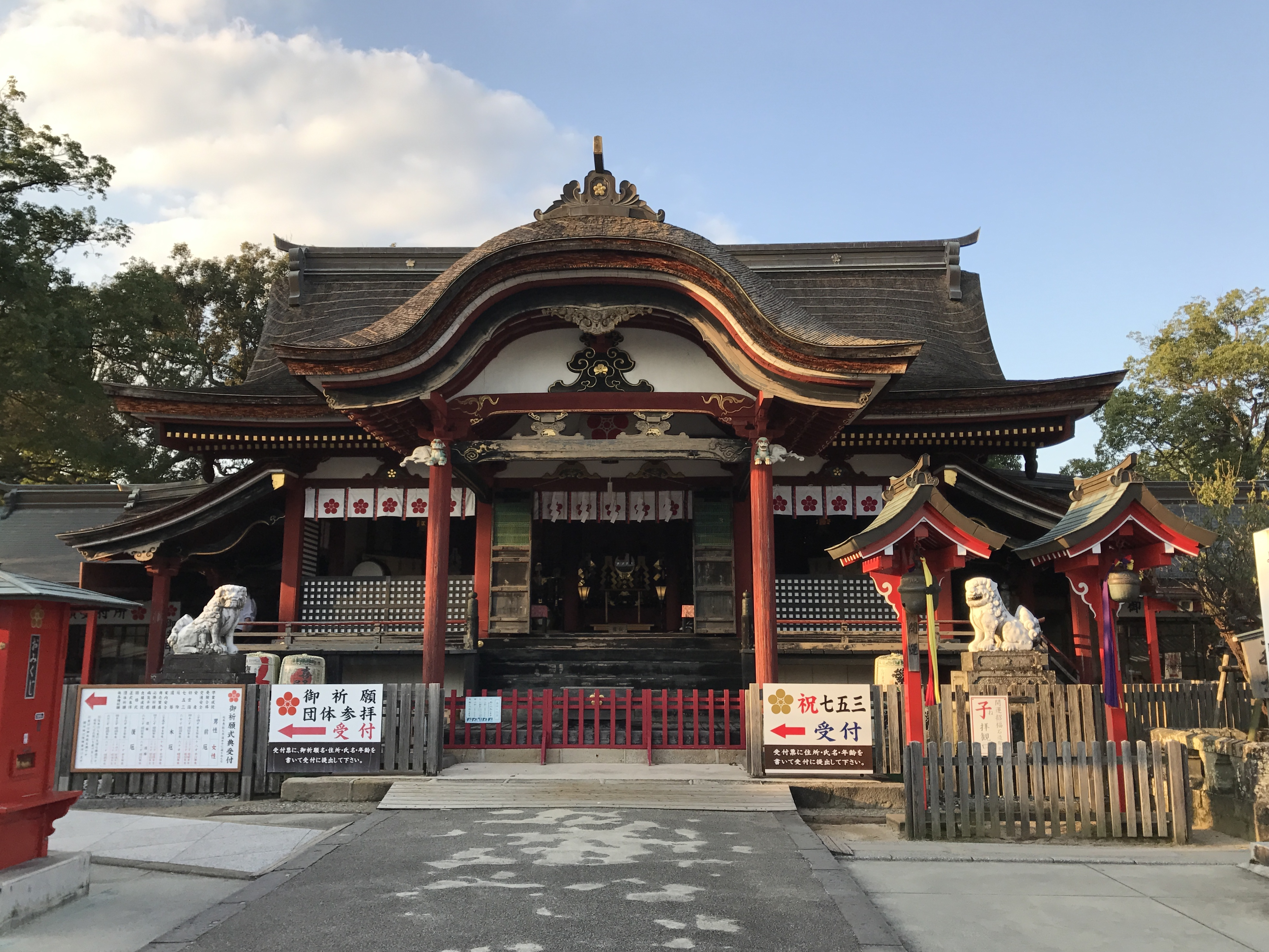 水田天満宮の拝殿